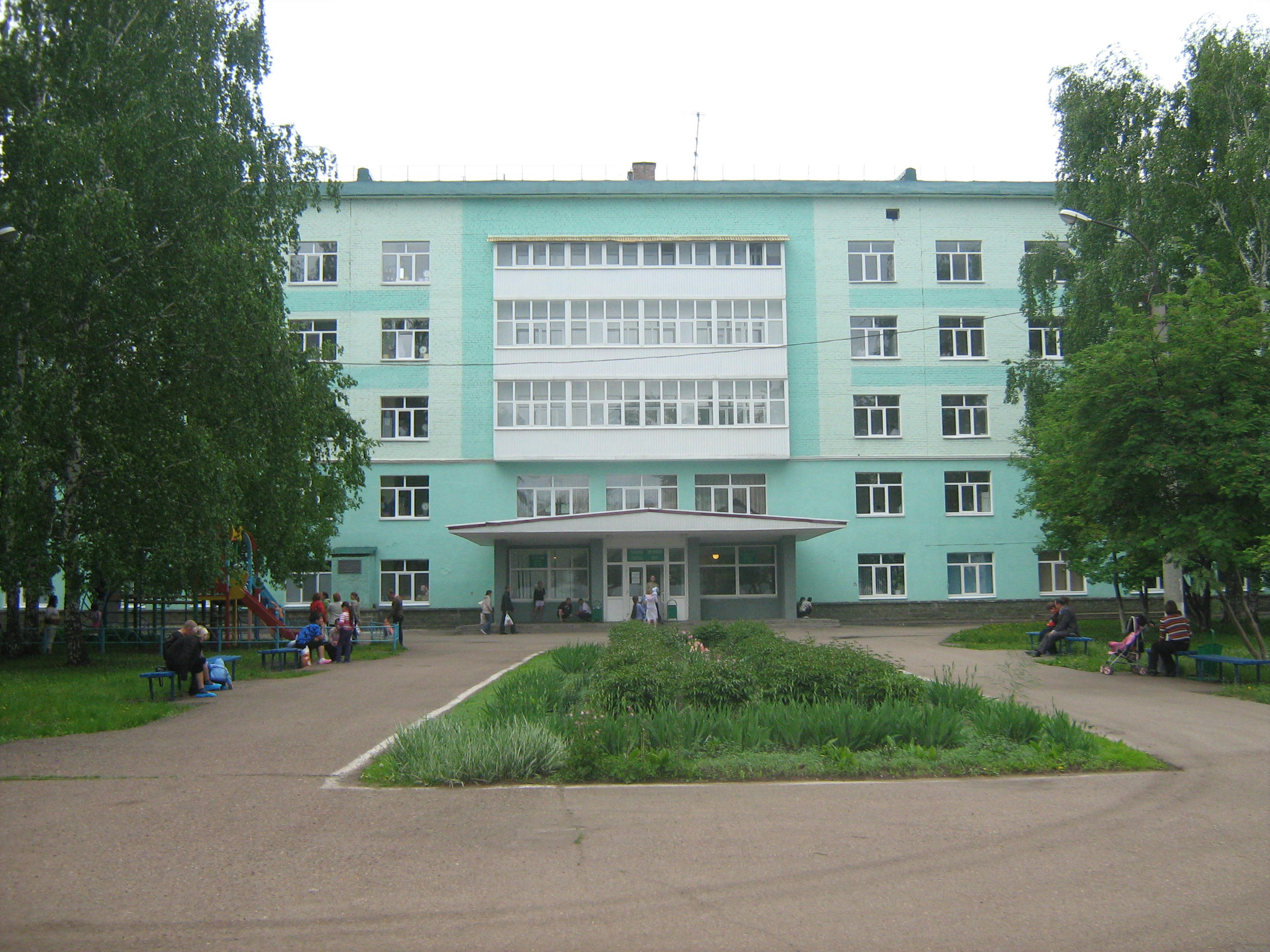 17 больница г. УфаTürkçe: Ufa 17.Hastanesi